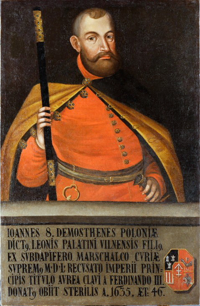 Беларуская (тарашкевіца): Партрэт Яна Станіслава Сапегі (Jan Stanisłaŭ Sapieha) гербу «Ліс» (1589—1635), дзяржаўнага дзеяча Вялікага Княства Літоўскага, падстолія вялікага, маршалка надворнага і вялікага.